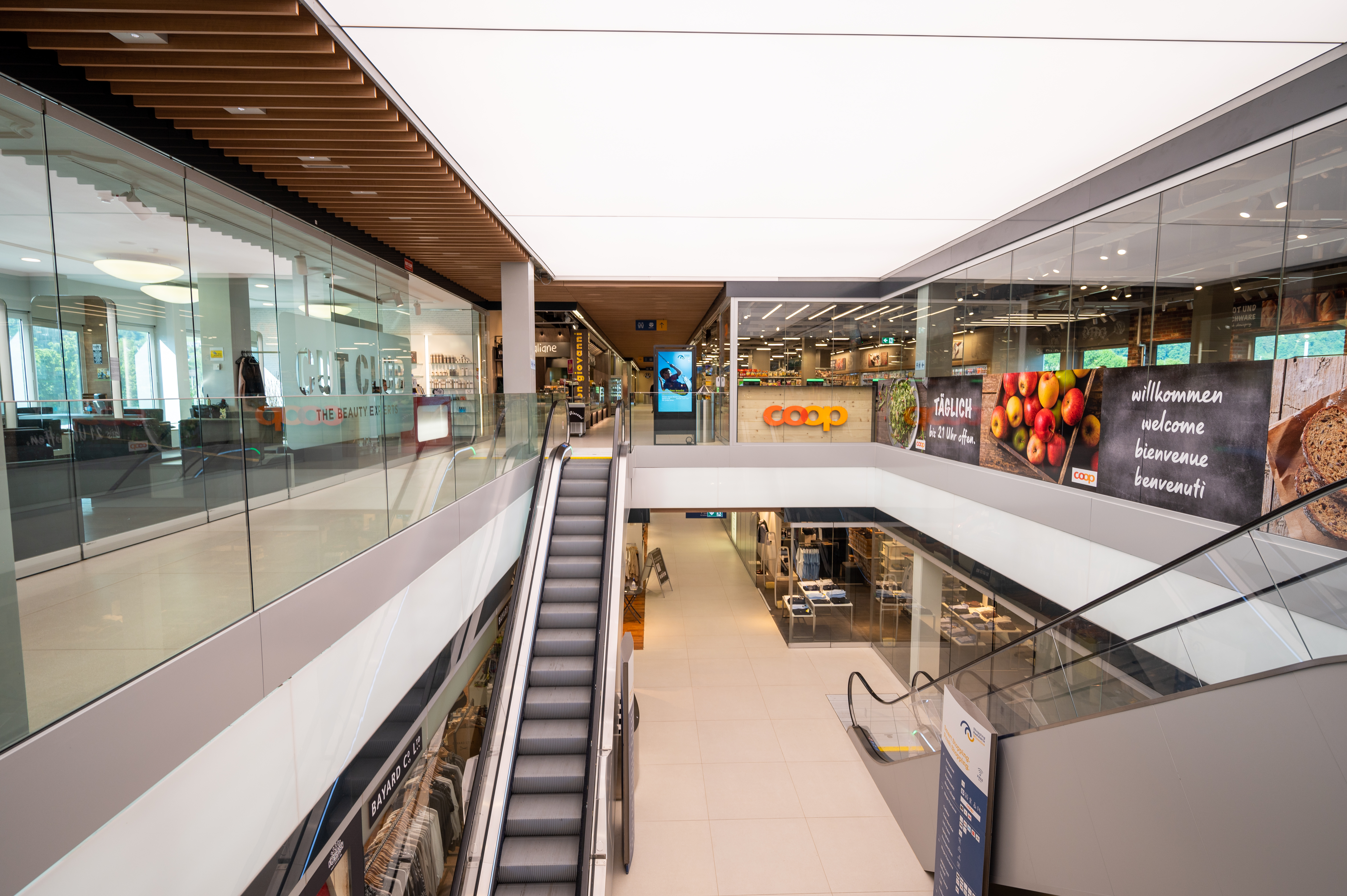 Im Rahmen des Umbaus 2019 wurde der Innenbereich mit neuen Böden, Licht- und Holzelementen sowie zwei Rolltreppen umgestaltet.